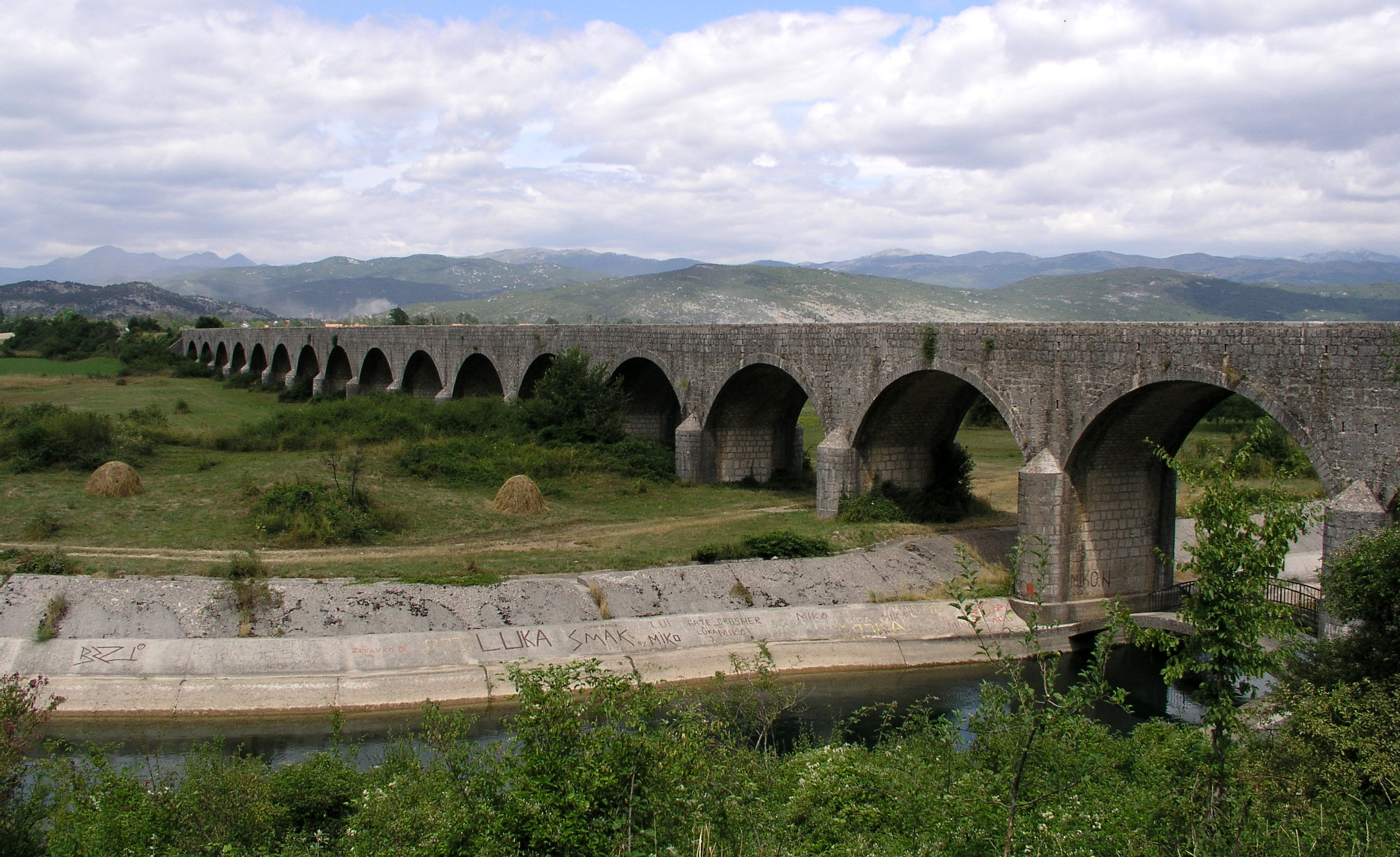 Niksic Tsar's Bridge